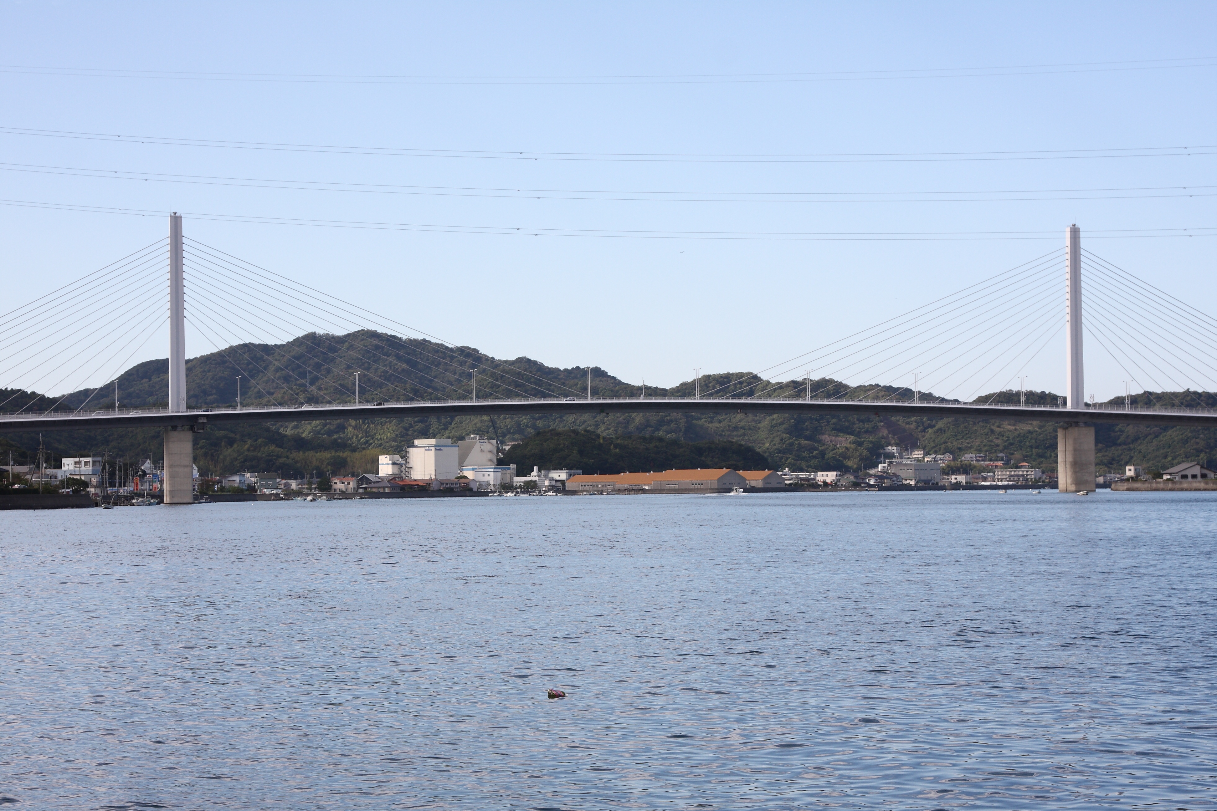 小鳴門大橋